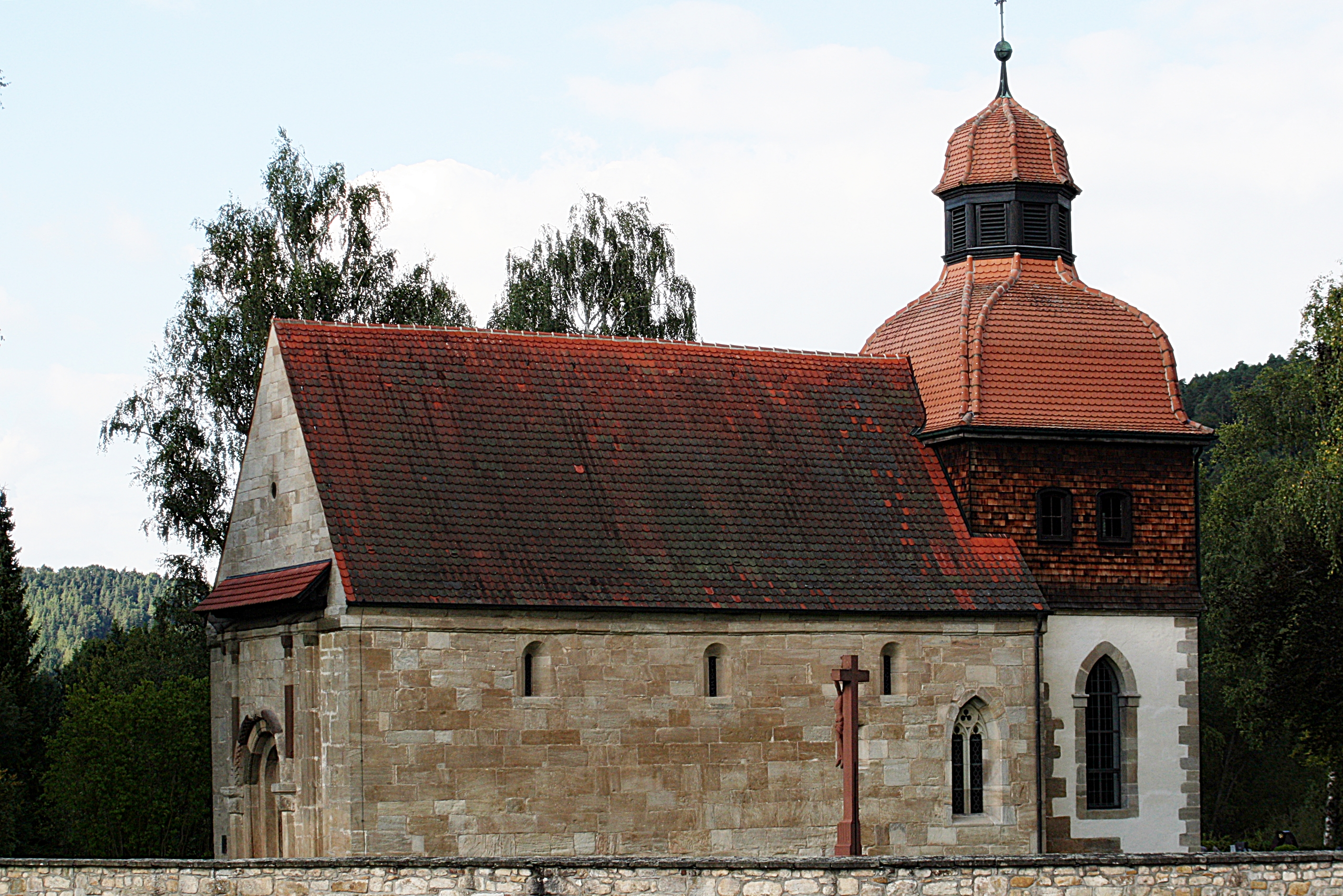 Owingen, Weilerkirche, Außenansicht